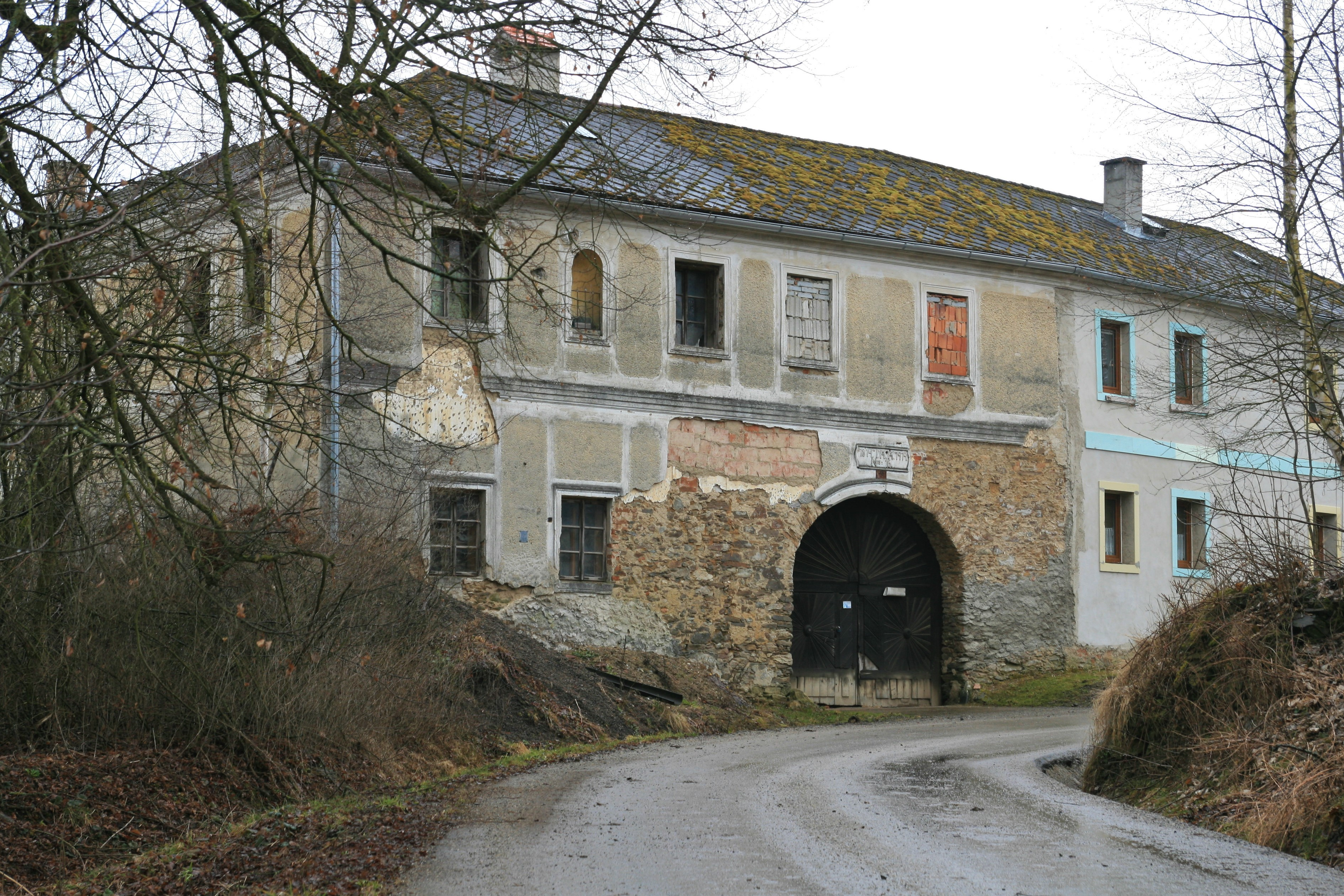 Vesnice Hašlovice, část obce Větřní v okrese Český Krumlov. Statek č. 16 v zatáčce silnice.